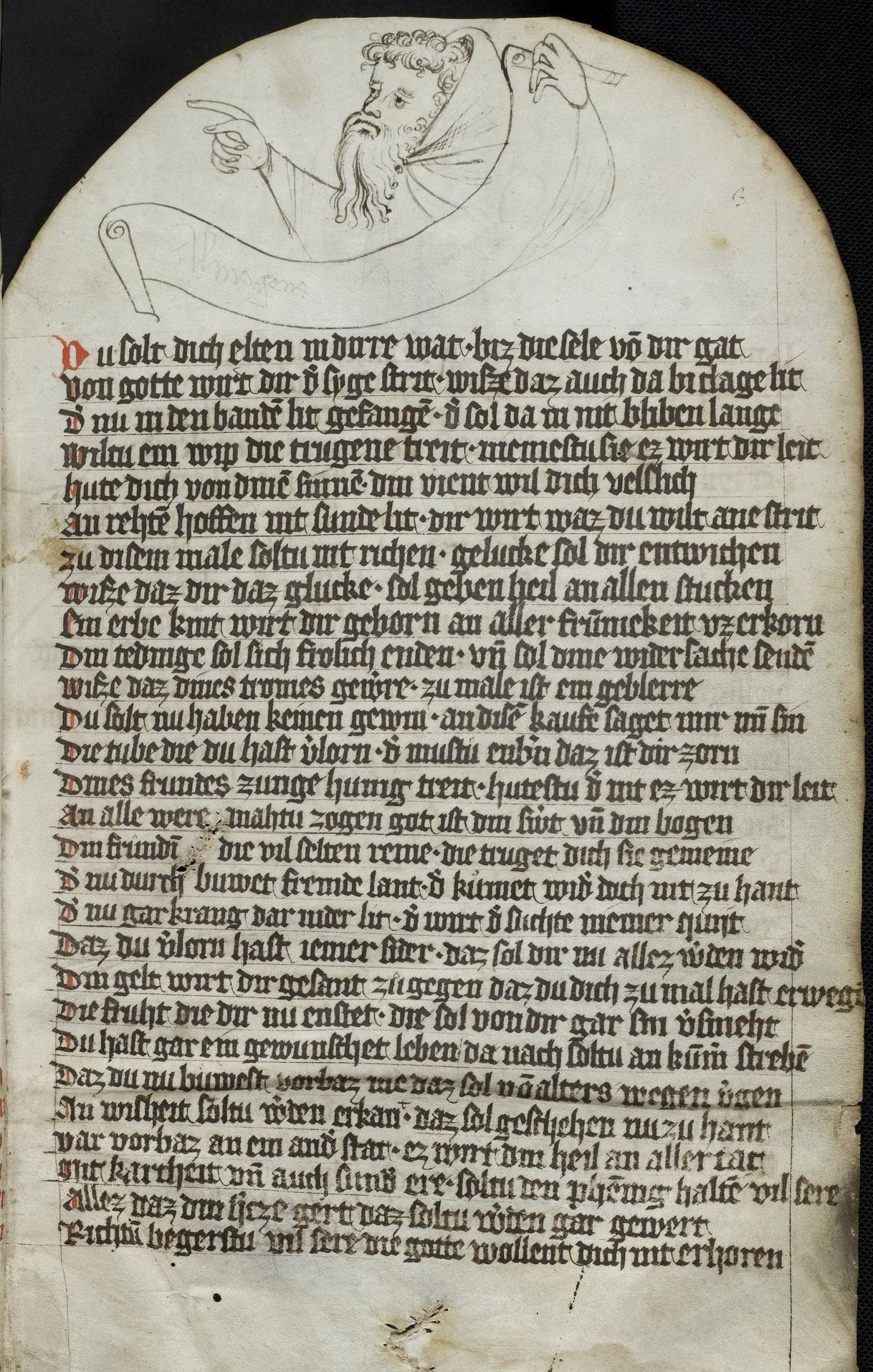 Codex Palatinus germanicus 3, Blatt 1r der Handschrift: "Mondbuch".